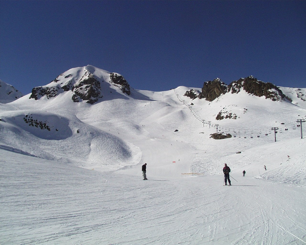 Photographie prise sur la piste Col des Lacs (bleue) à 2400m d'altitude. On peut voir à droite, le télésiège 3 places des 3 lacs ainsi qu'au fond, le sommet des pistes du domaine skiable de Saint-Sorlin-d'Arves, à 2620m d'altitude. Il s'agit également du point culimant du domaine des Sybelles. L'image a été prise en mars 2004 par Utilisateur:Accrochoc.